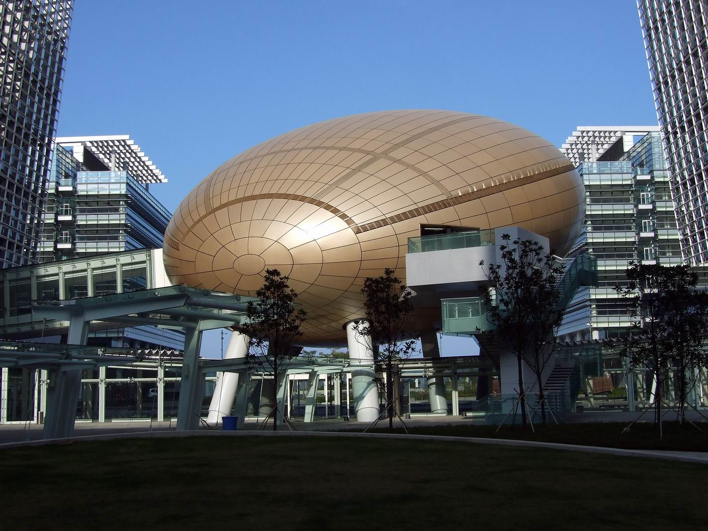 科學園二期地標：演講廳